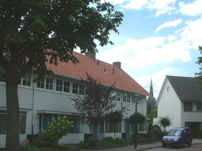 Tuindorp, Witte Dorp, in Eindhoven, Burghplein, monument